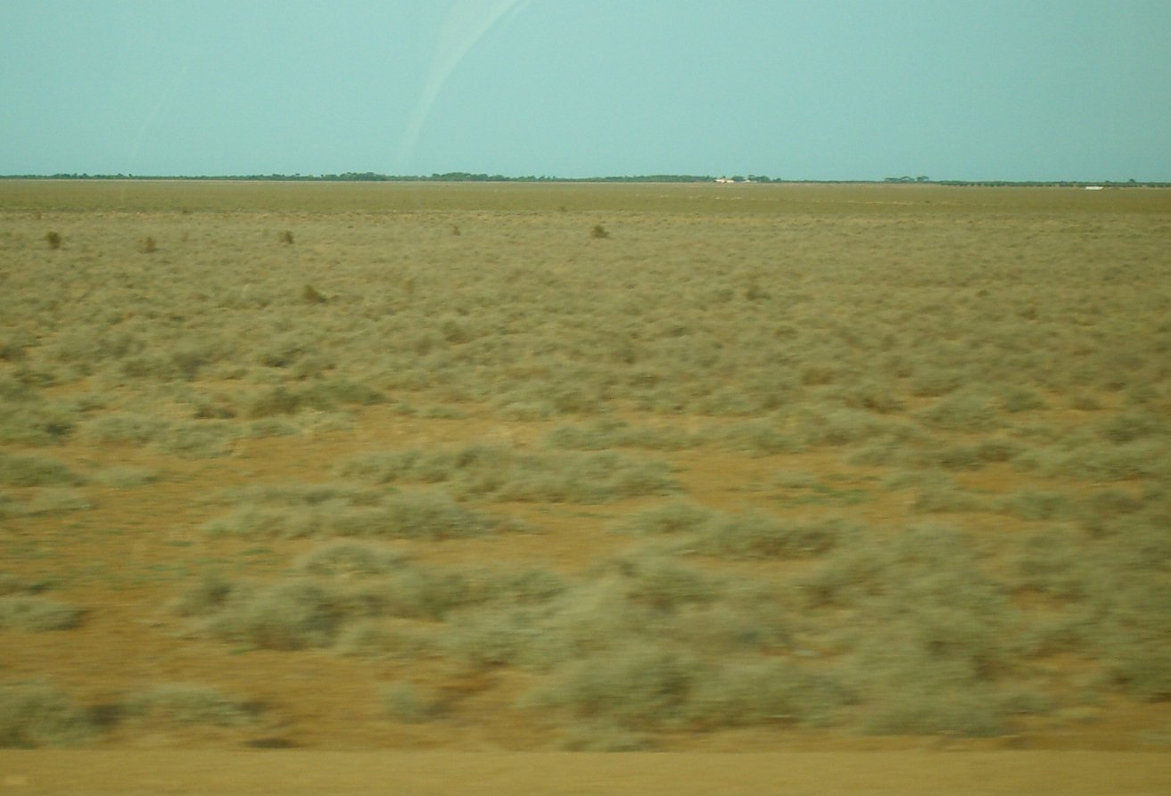 rodalies d'Enfhida